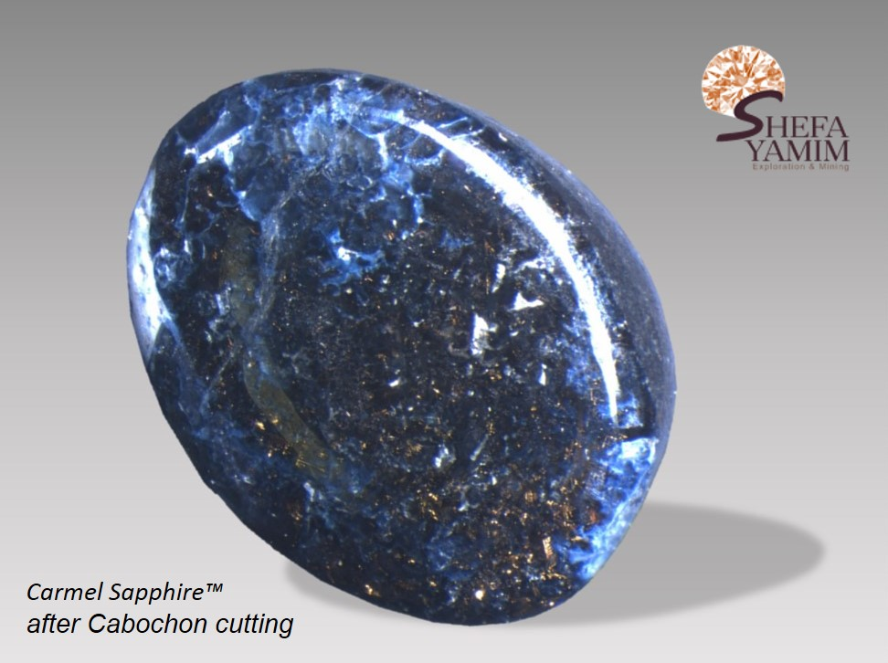 Carmel Sapphire found by Shefa Yamim